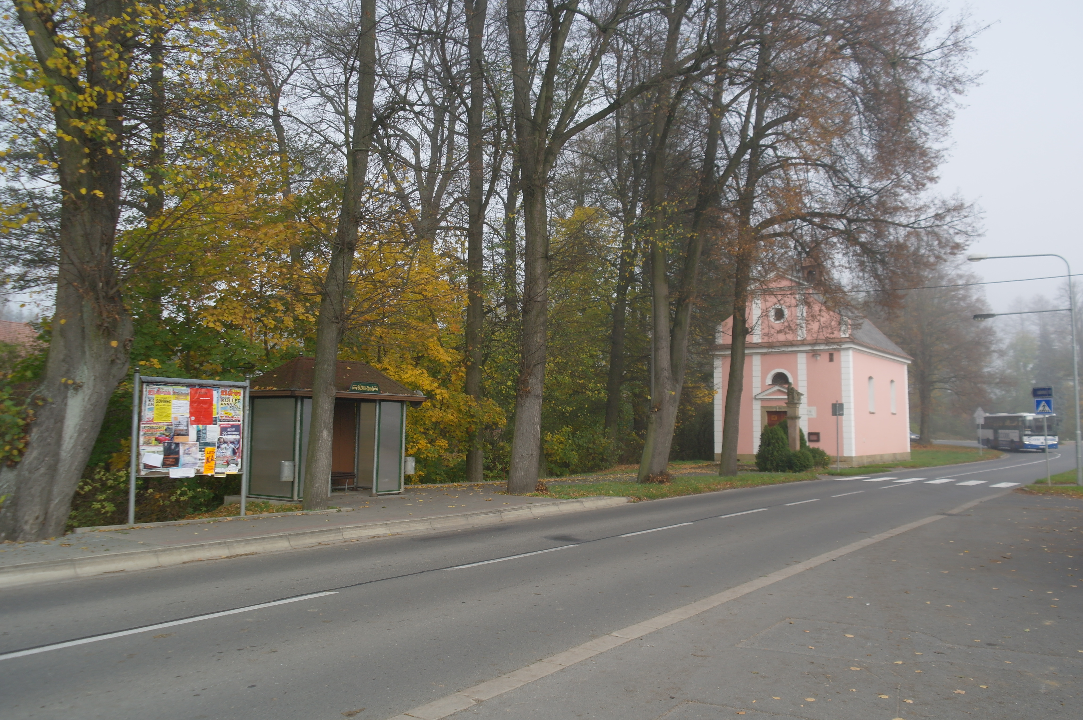 Sázava, kaple a autobusová zastávka ve středu obce